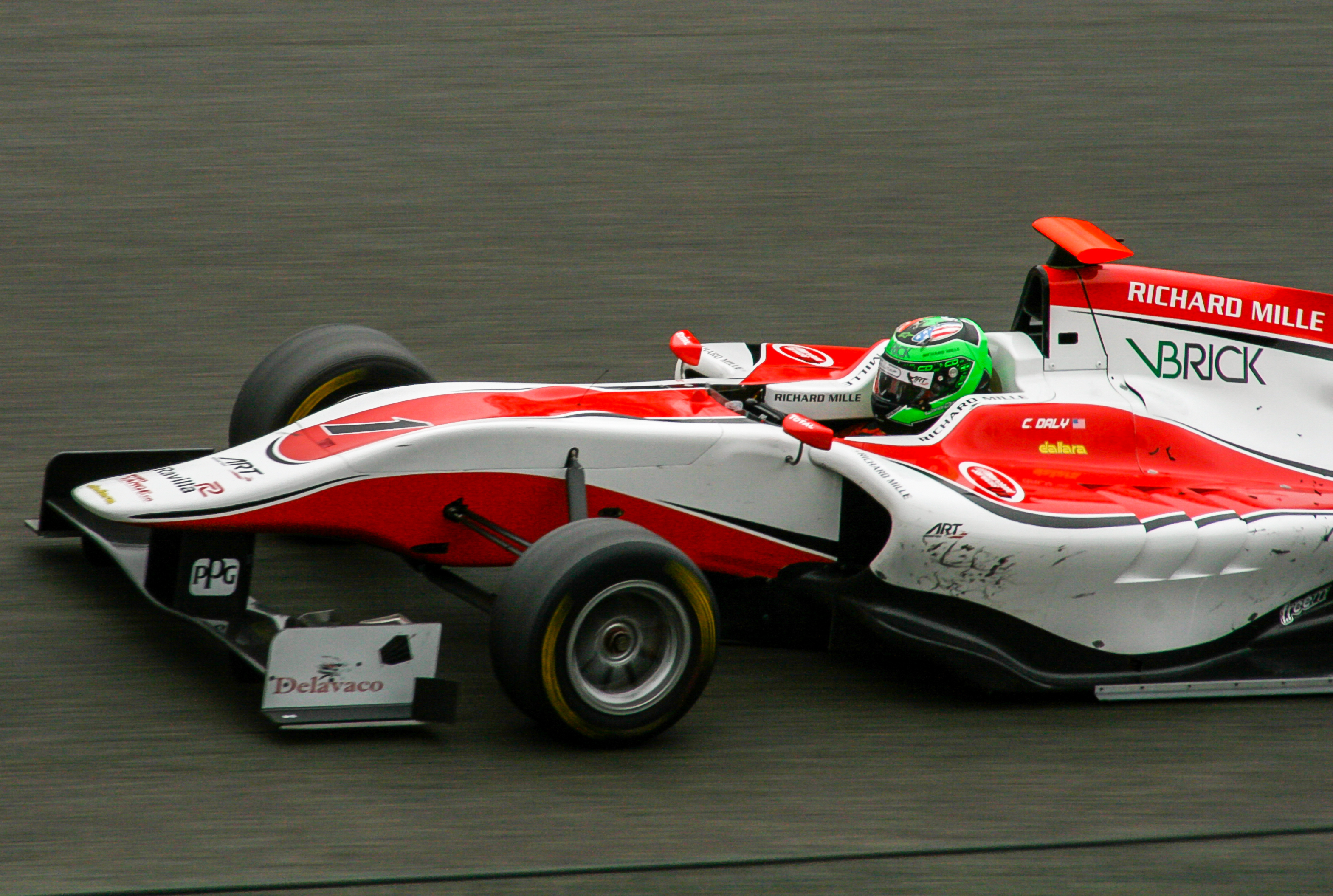 Conor Daly beim Sprintrennen der GP3-Serie in Spa-Francorchamps 2013